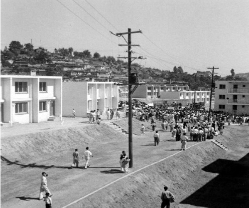 한.미재단 주택인수식 (서울 종로구 행촌동)